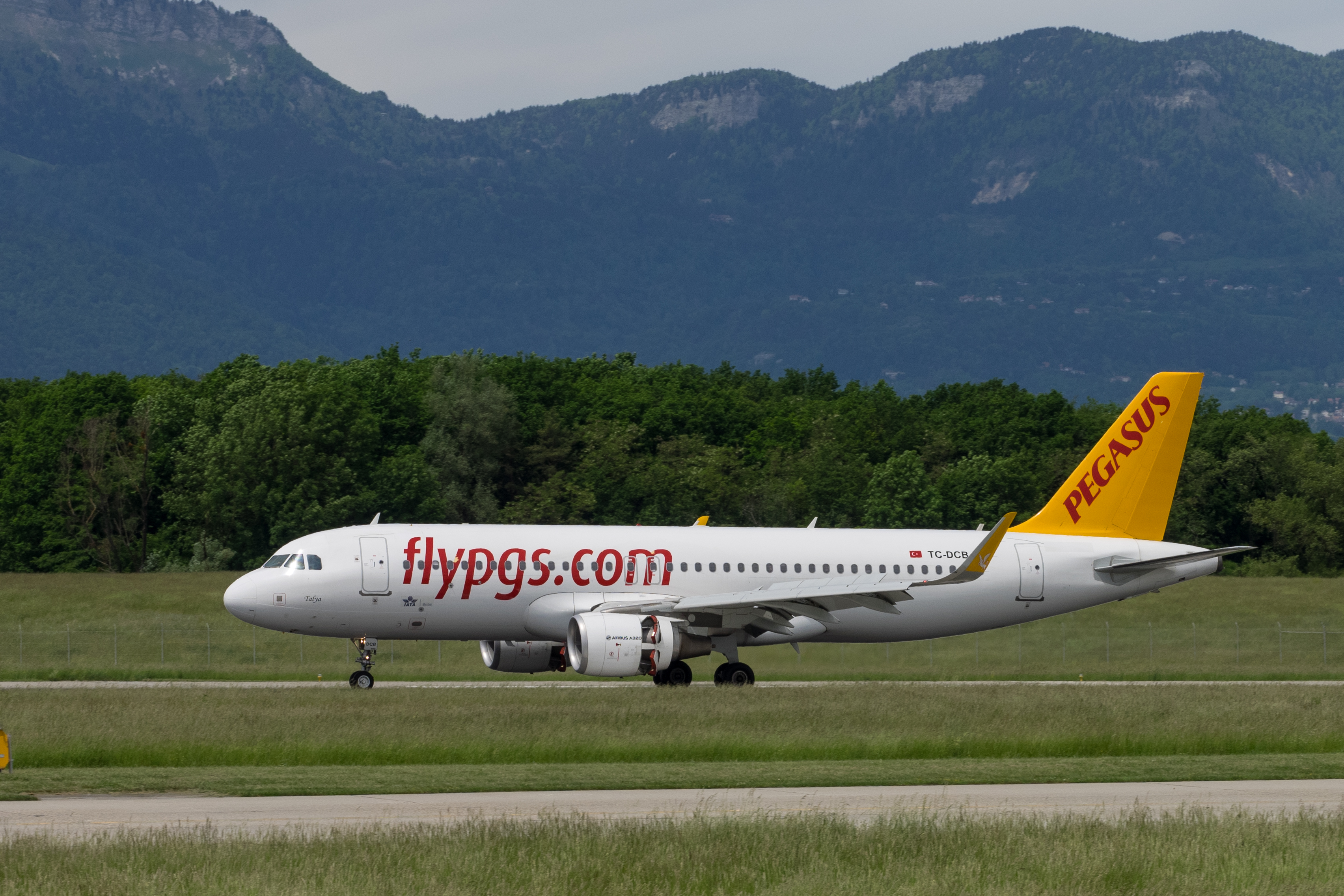 GVA 14.05.2015